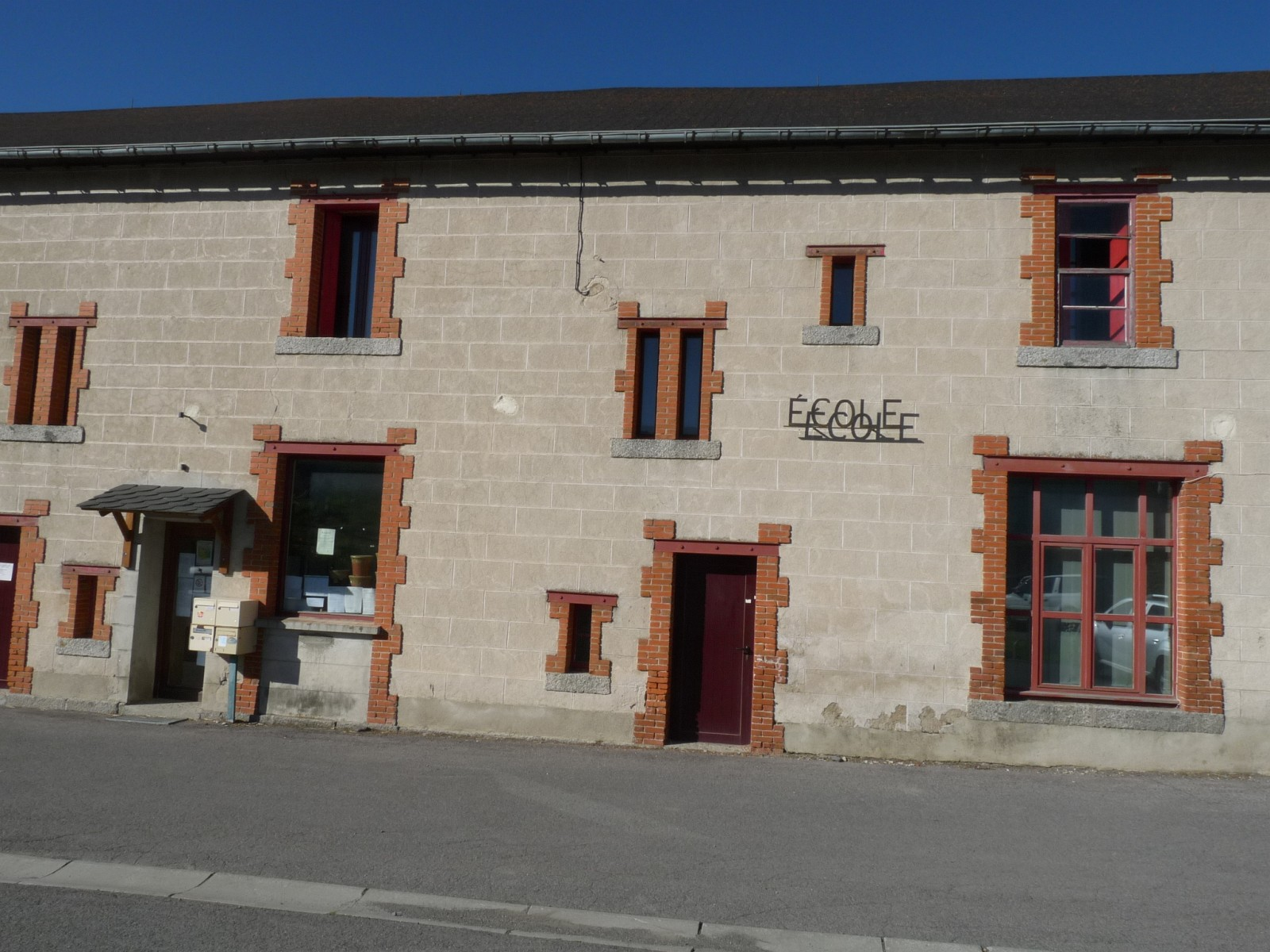 Ecole de La Llagonne, Pyrénées-Orientales, France